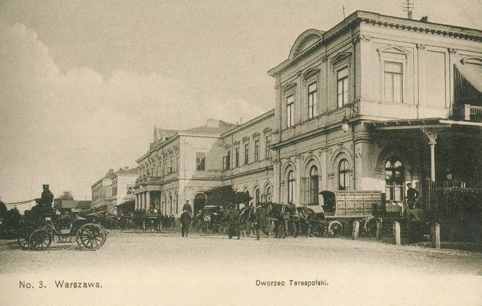 Warszawa Wileńska railway station